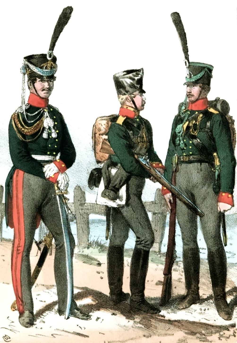 Jäger des 2. (Magdeburgischen) Jäger-Bataillon, im Stiftungsjahr 1815.